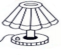 Table lamp SKM